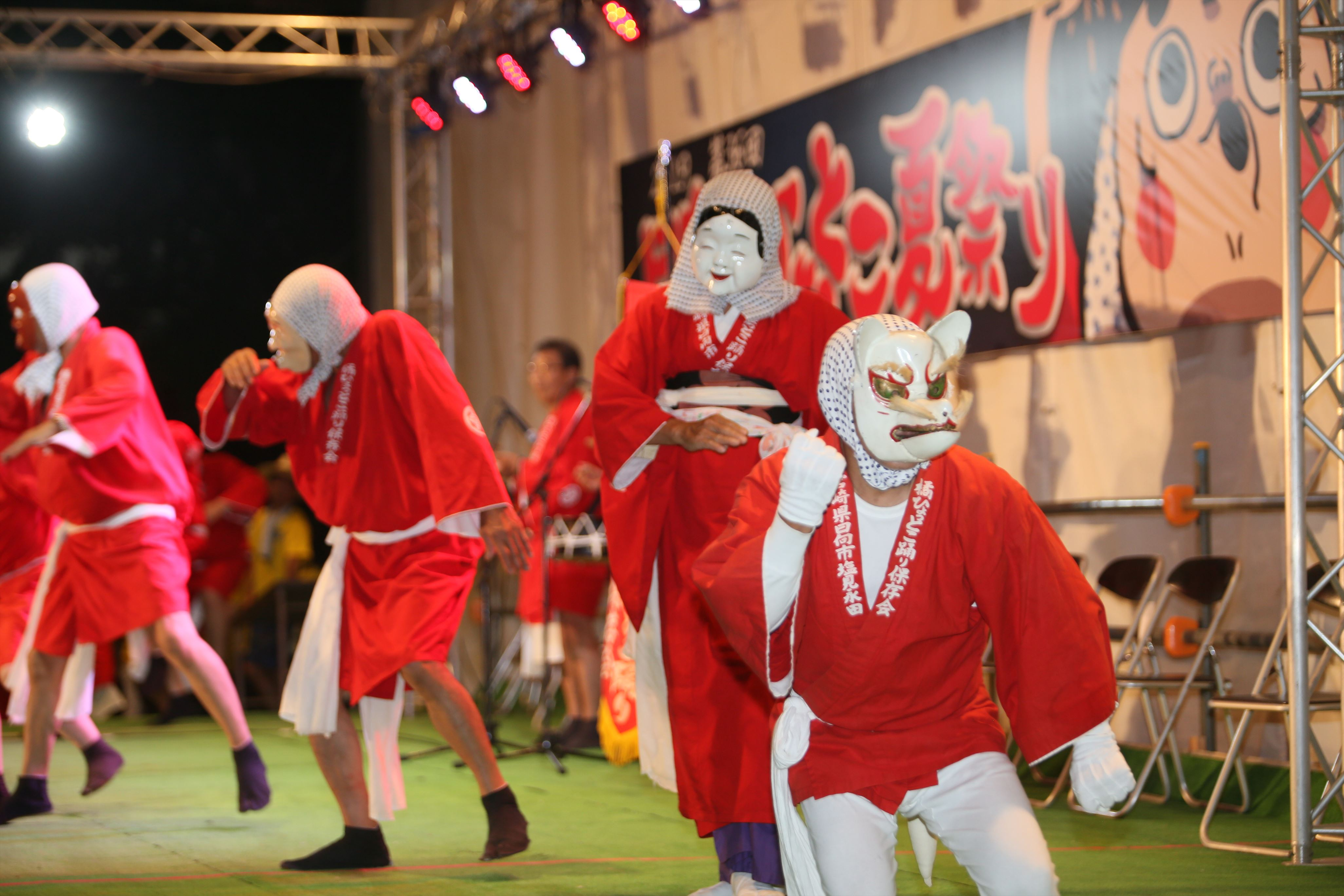 日向ひょっとこ夏祭りステージでの出演